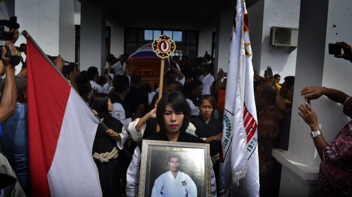 Keluarga Besar PERKEMI NTT Indonesia Menyambut kedatangan Jenasah Senpai Nabas dari Hongkong.